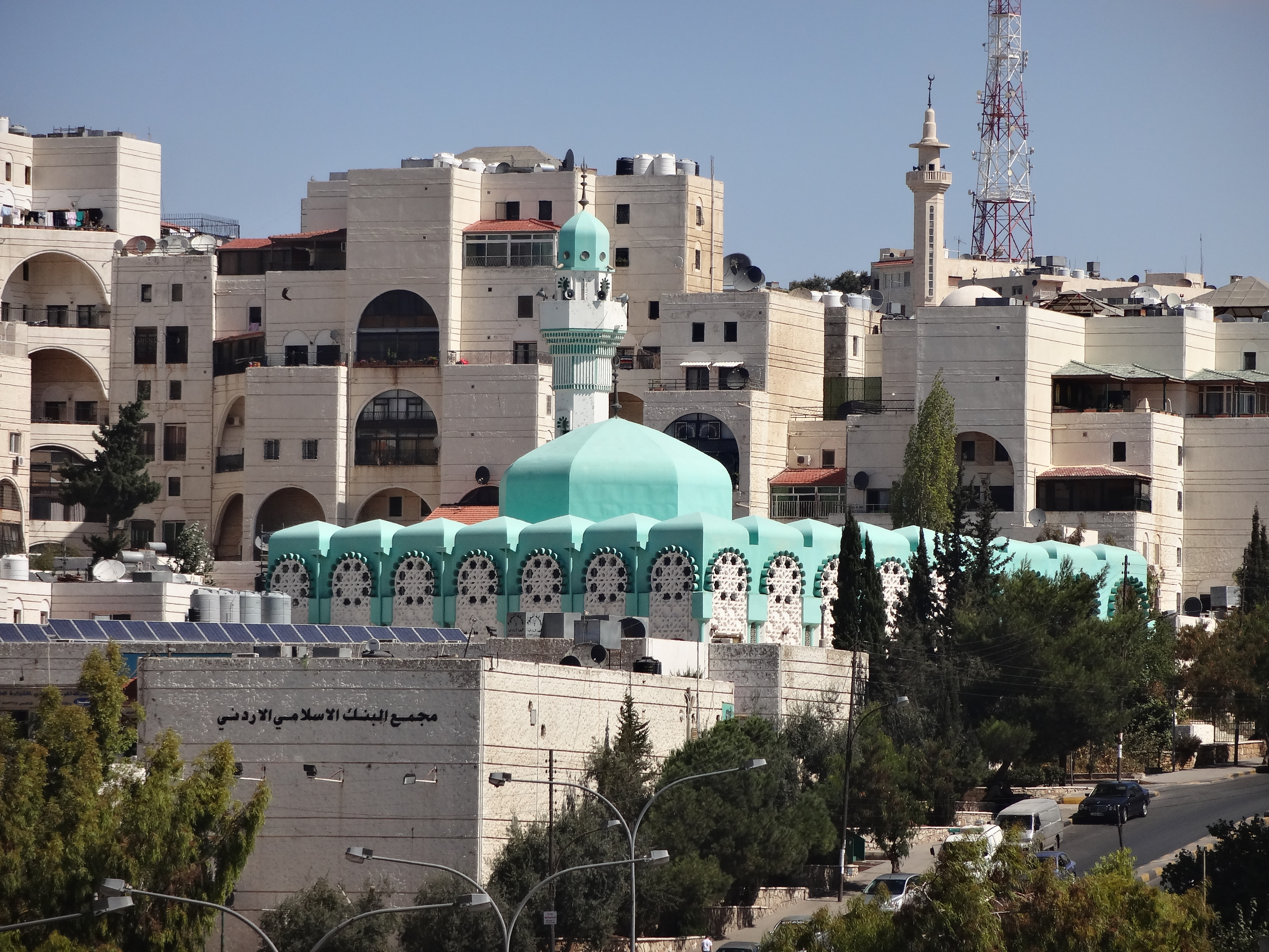 Al Rawdah Mosque, Amman